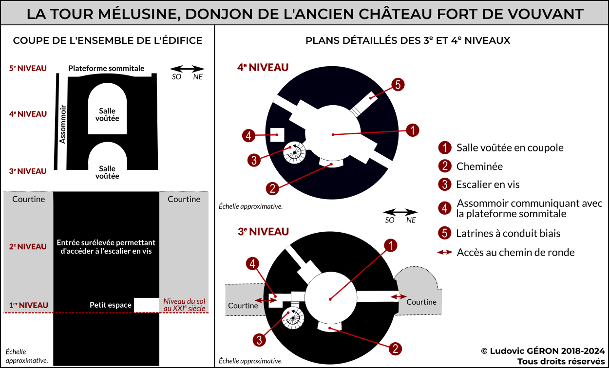 Plans de la tour Mélusine, donjon de l'ancien château-fort de Vouvant (édifié entre la fin du XIIè siècle et le début du XIIIè siècle). Plans réalisés à partir de la visite de la tour ainsi que par la consultation de divers ouvrages spécialisés.